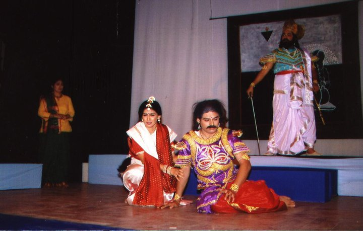 ಕನ್ನಡ: Avinash Kamath in 'Ambe' kannada Play as King Salva.